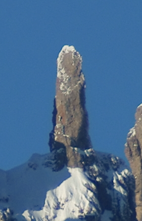 Vèneto: Gusèla, alteža: 40m